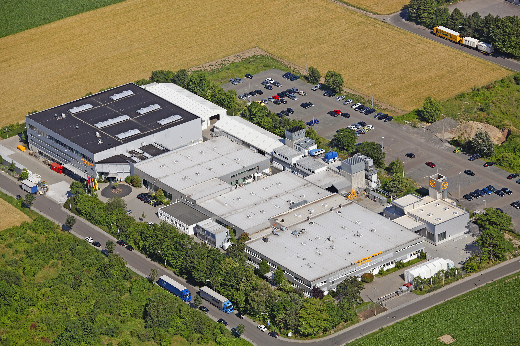 Betriebsgelände der Lufthansa Technik AERO GmbH